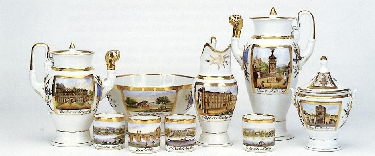 Ansichten-Service, weißer Fond mit Trophäen (Stadtmuseum Simeonstift Trier)